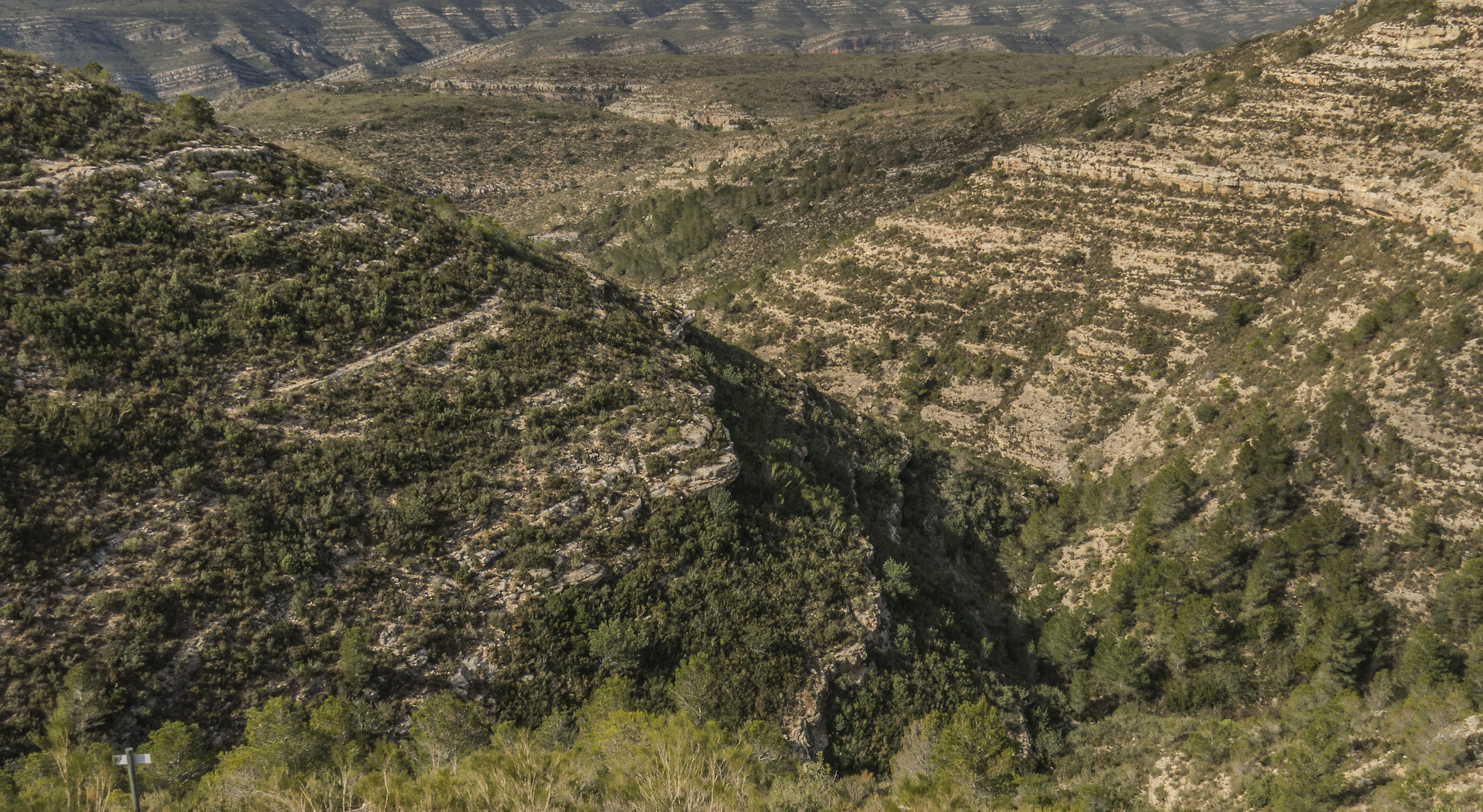 És un barranc de la Ribera Alta del País Valencià, situat al terme de Tous. Pertany a la conca del Xúquer. La font el Chorrico està dins d'aquest barranc.